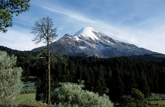 Volcàn Citlaltépetl or Pico de Orizaba (México).